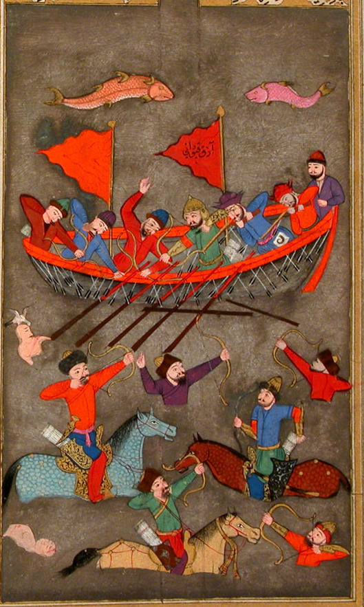 Secaatname 0215